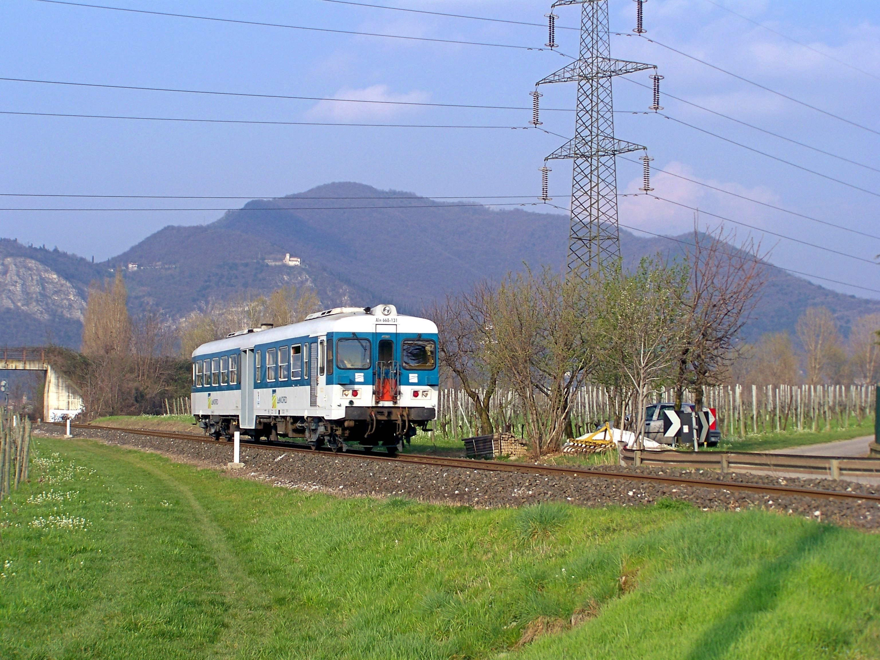 L'ALn 668.131 in prossimità della stazione di Borgonato-Adro, mentre espleta la corsa S 257 Iseo-Rovato Borgo.